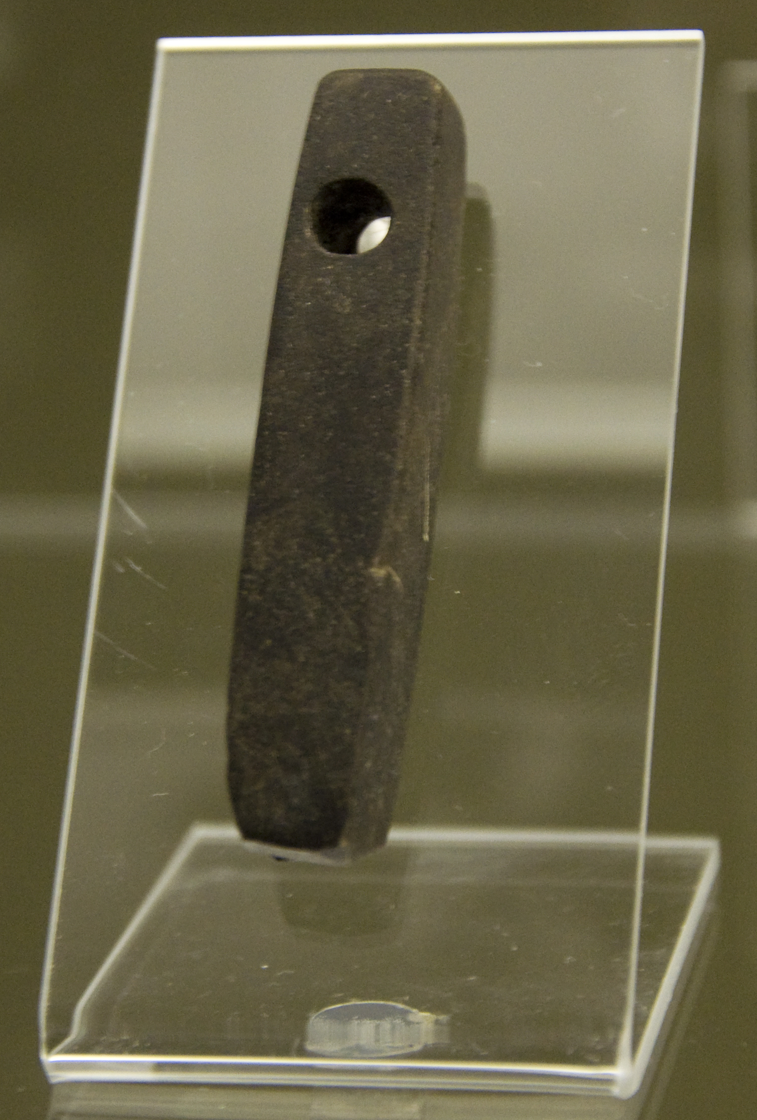 Toetssteen, gevonden in Ename, België